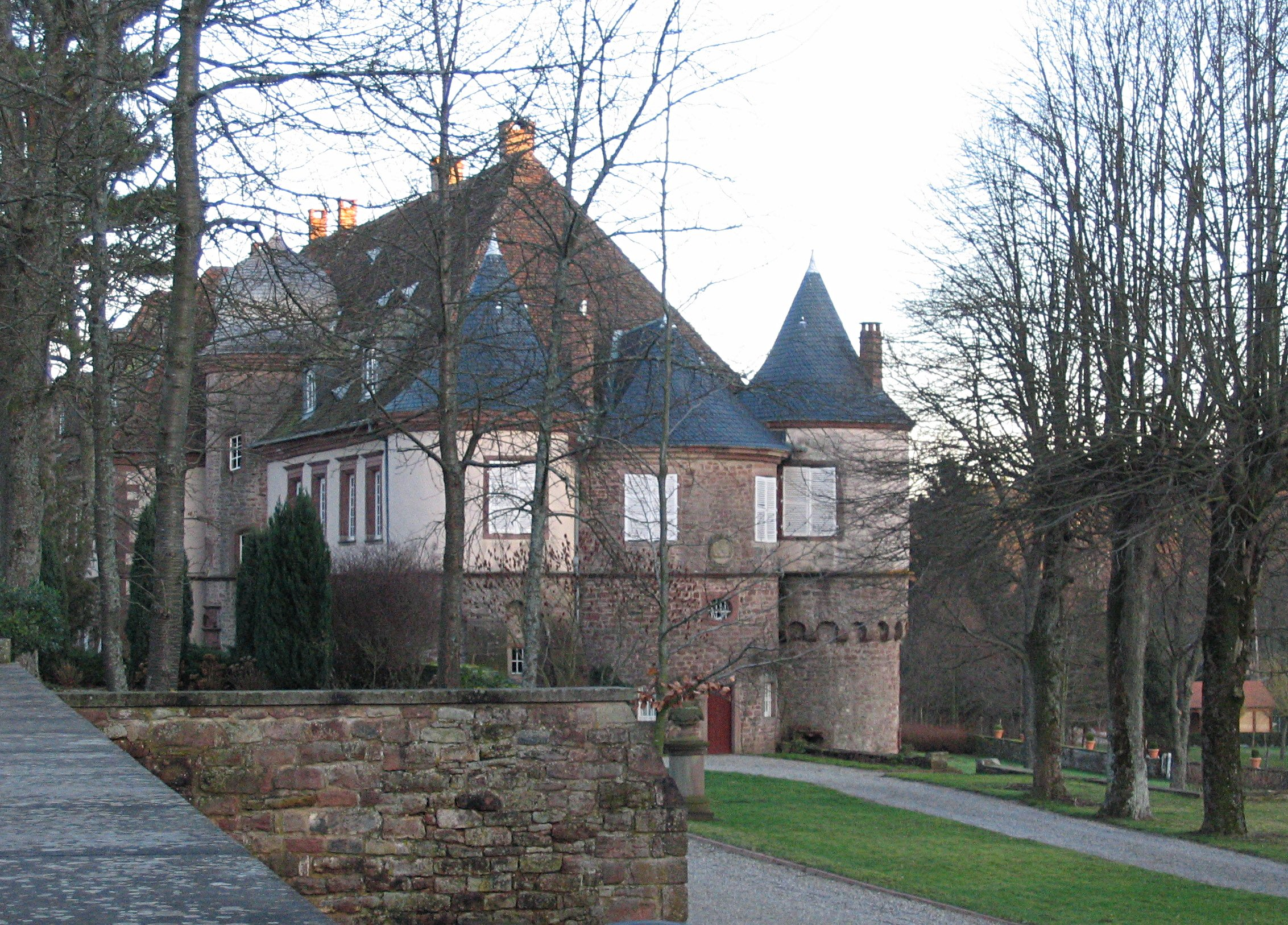 Château de Birkenwald (Bas-Rhin) construit en 1562 et classé monument historique.